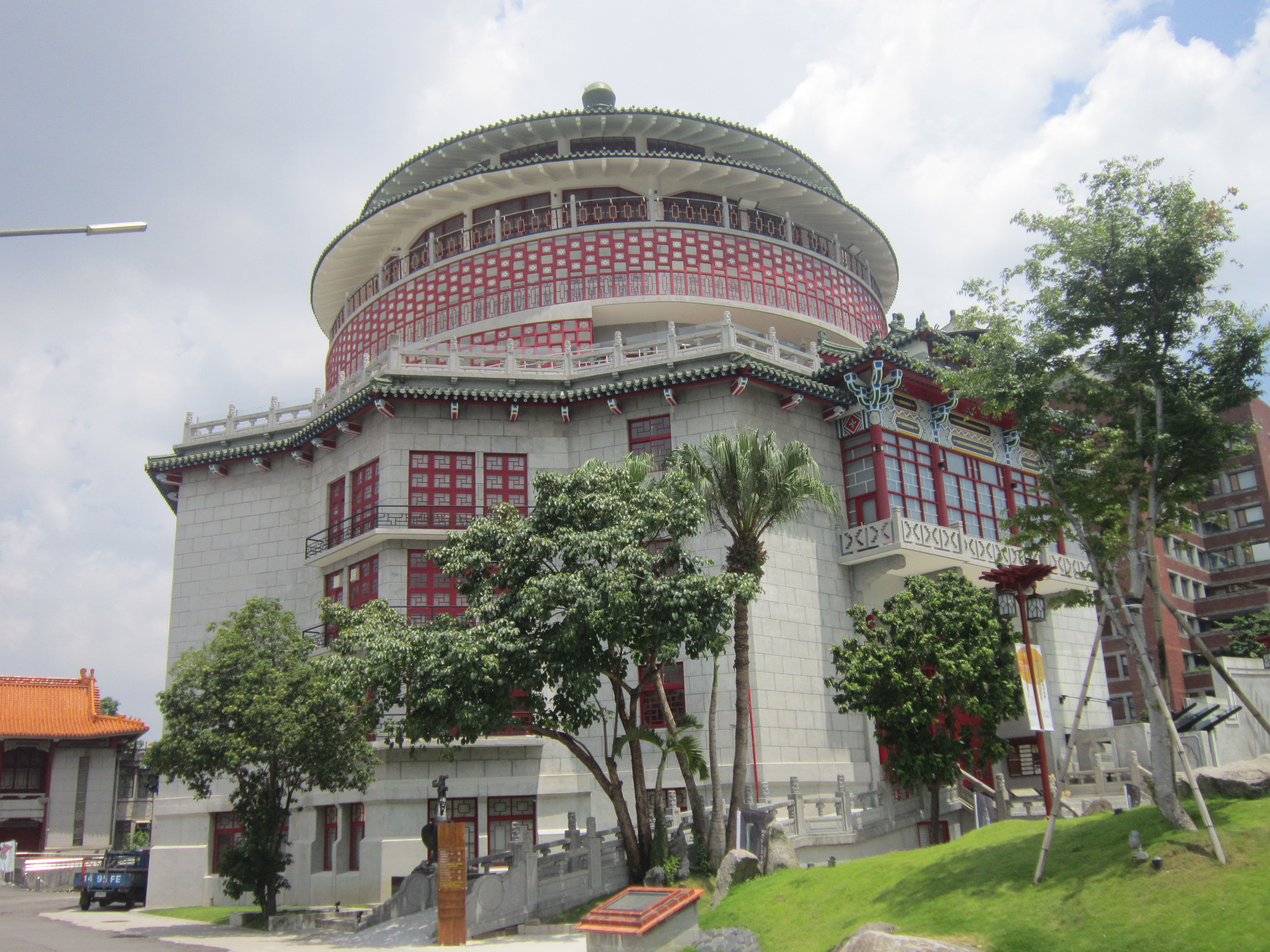 國立台灣科學教育館舊館一景